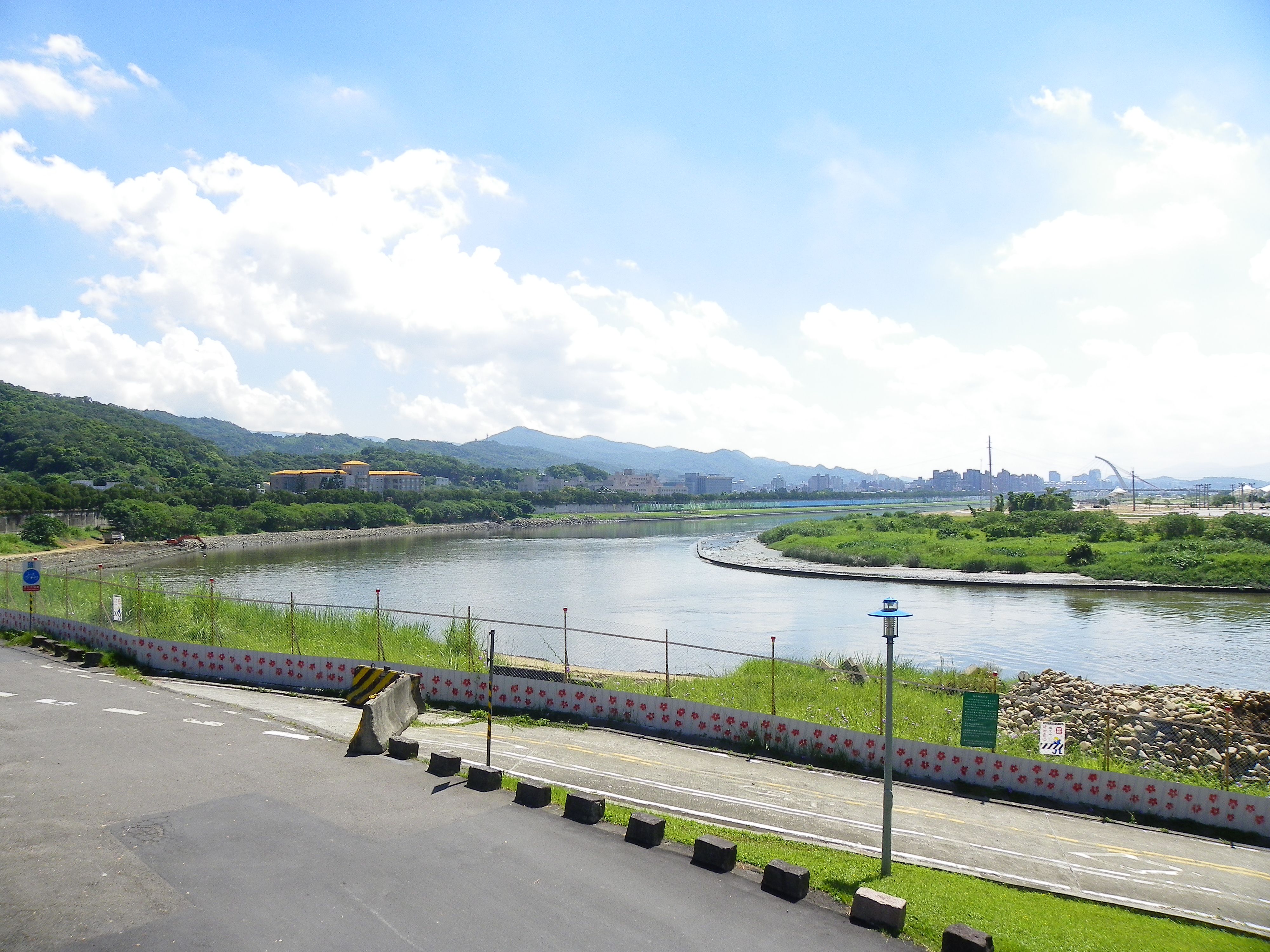 自臺北市大直流向劍潭山麓劍潭段的基隆河。